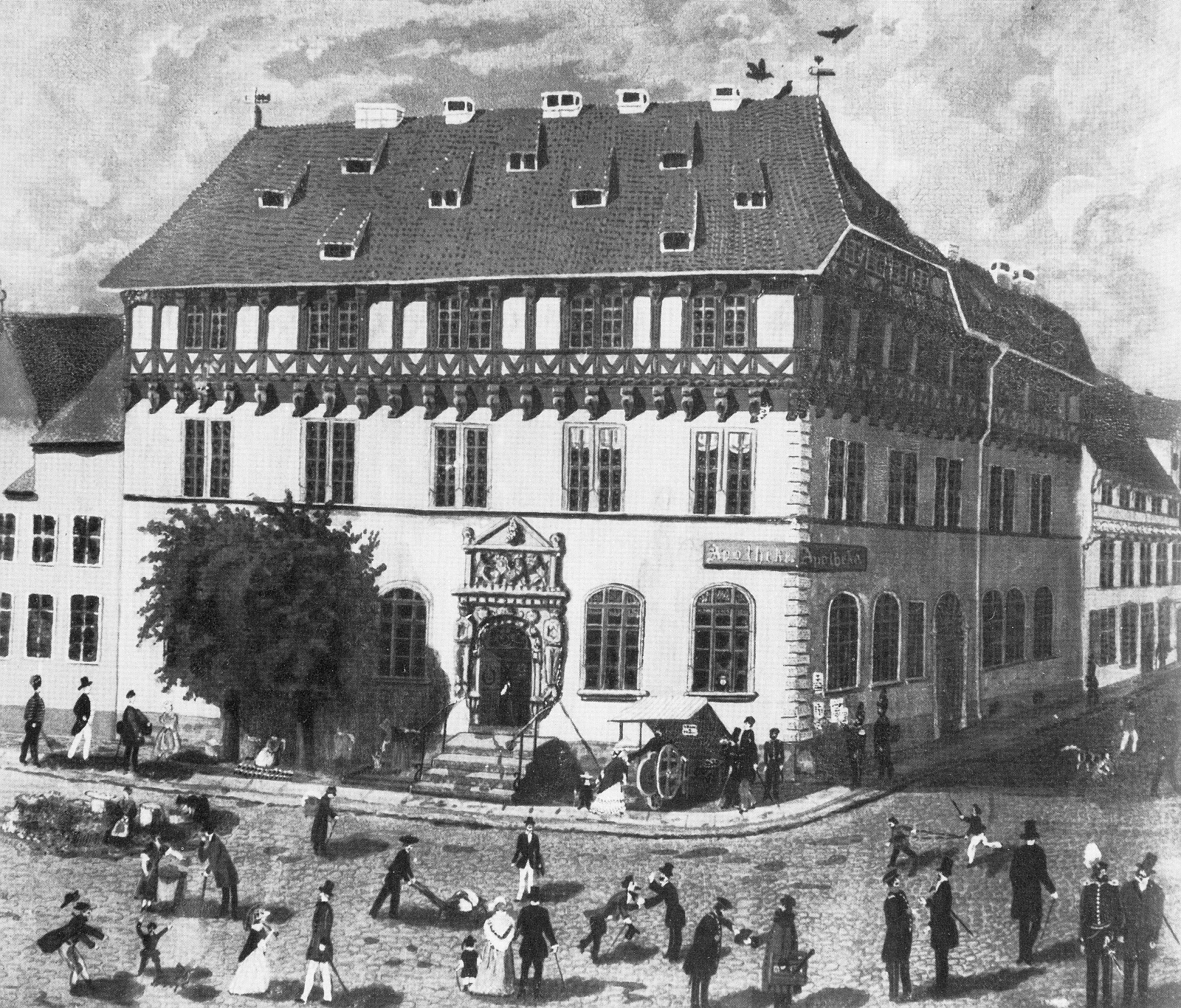 Braunschweig: Hagenmarkt-Apotheke von Südosten im Jahre 1848.